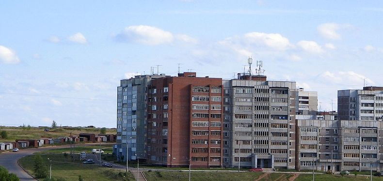 Улица Победы (Кирово-Чепецк)